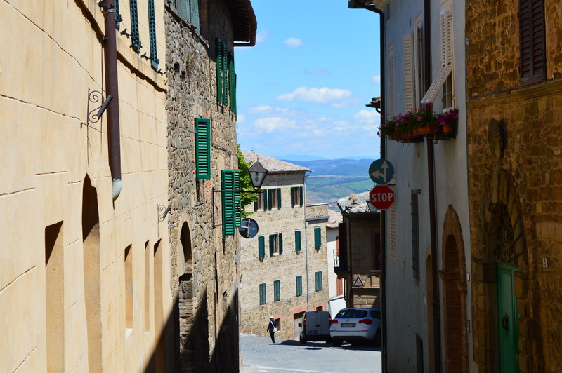 Montalcino, town street, view on Toscana